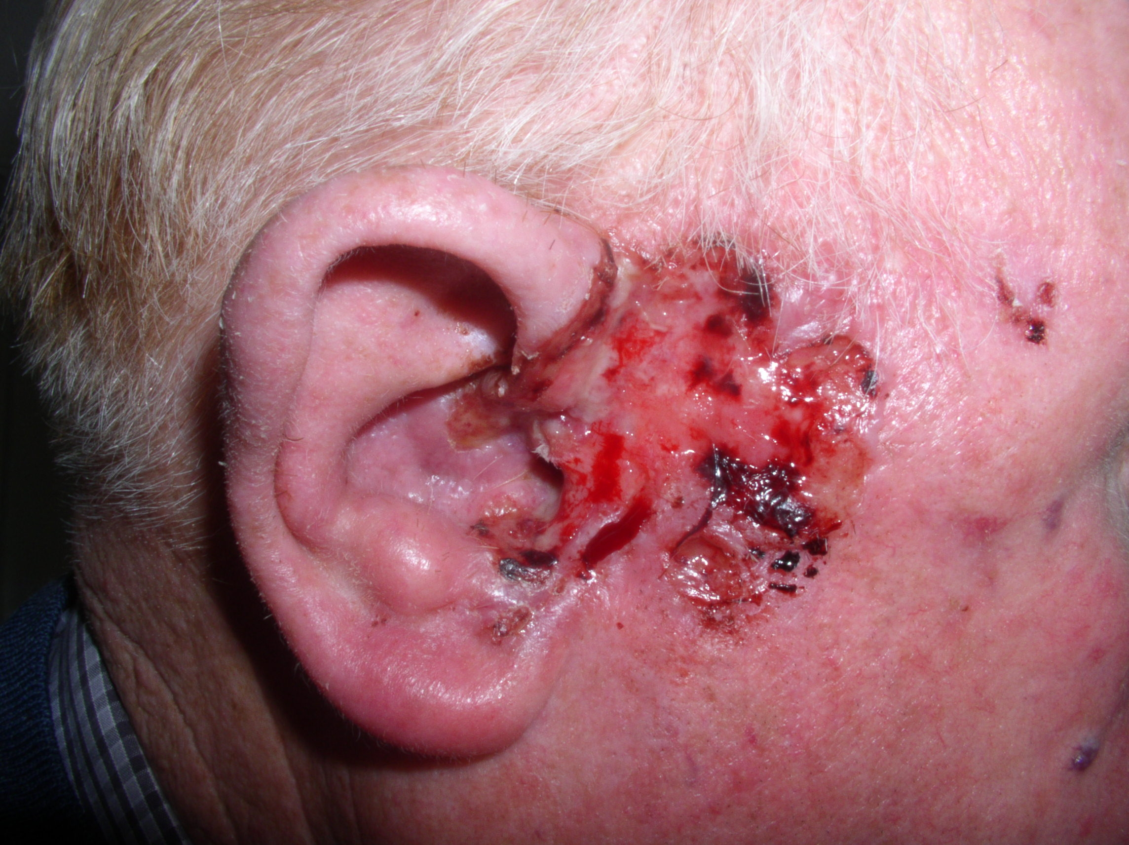 Basal cell carcinoma in 75-year-old man